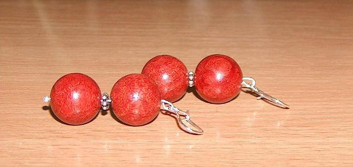 koral, autor zdjęcia Grzegorz Framski, 15.10.2006 r.